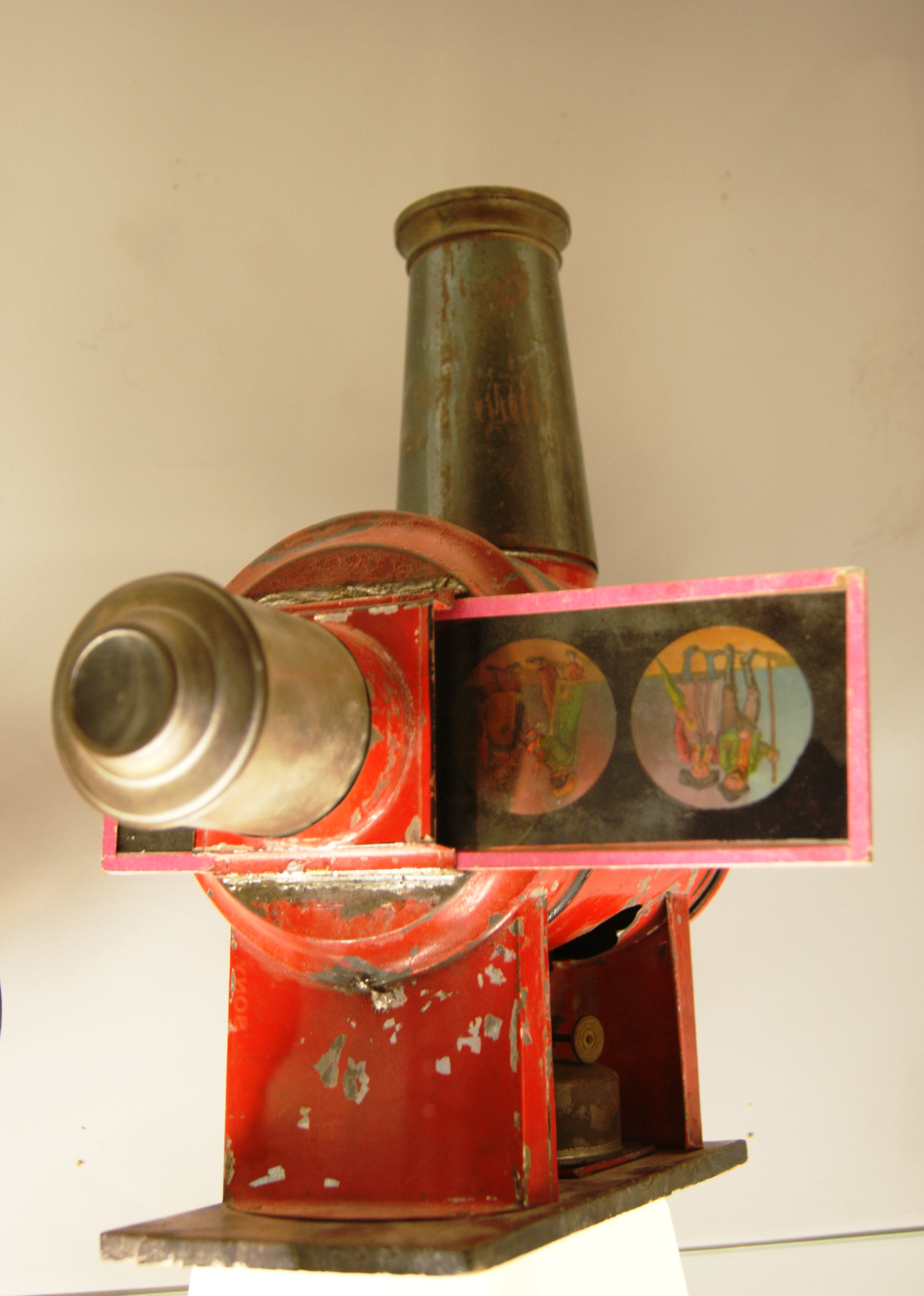 Lanterne magique